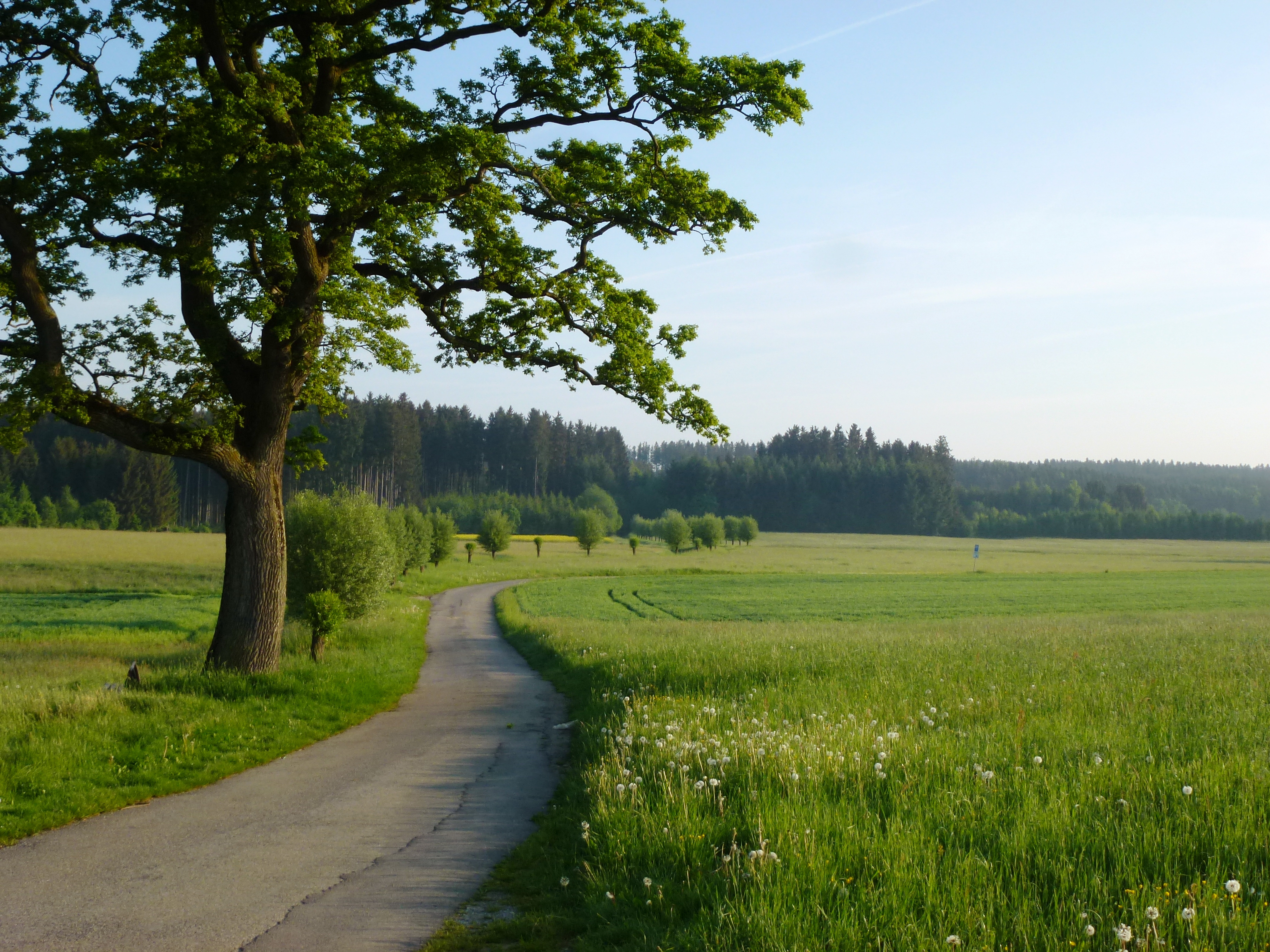 Parsberg-Süd, Aufnahme von 48.12128 N, 11.33184 O, Richtung N